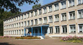 Школа № 2 (Кирово-Чепецк)